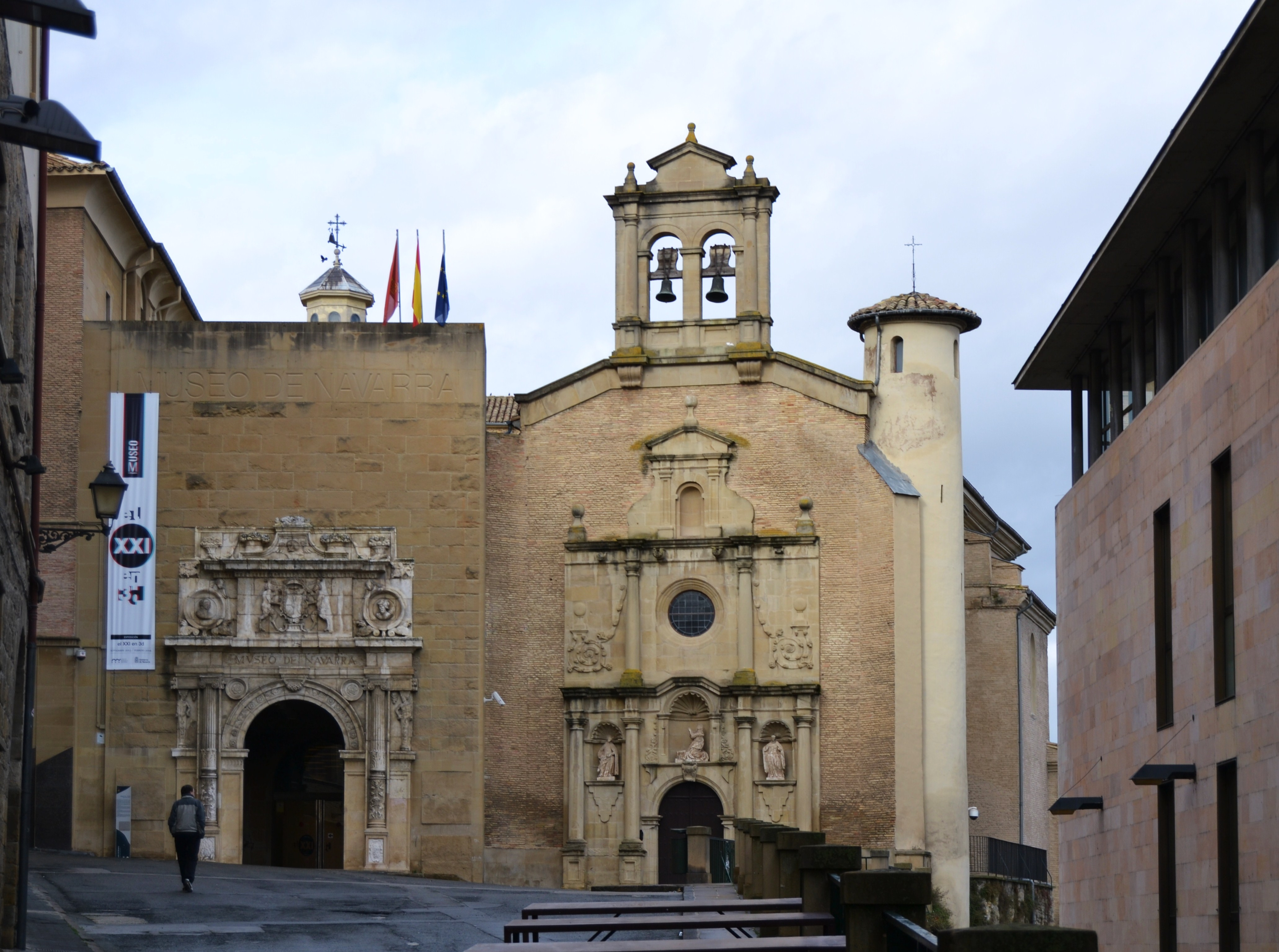 Museu de Navarra, façanes.